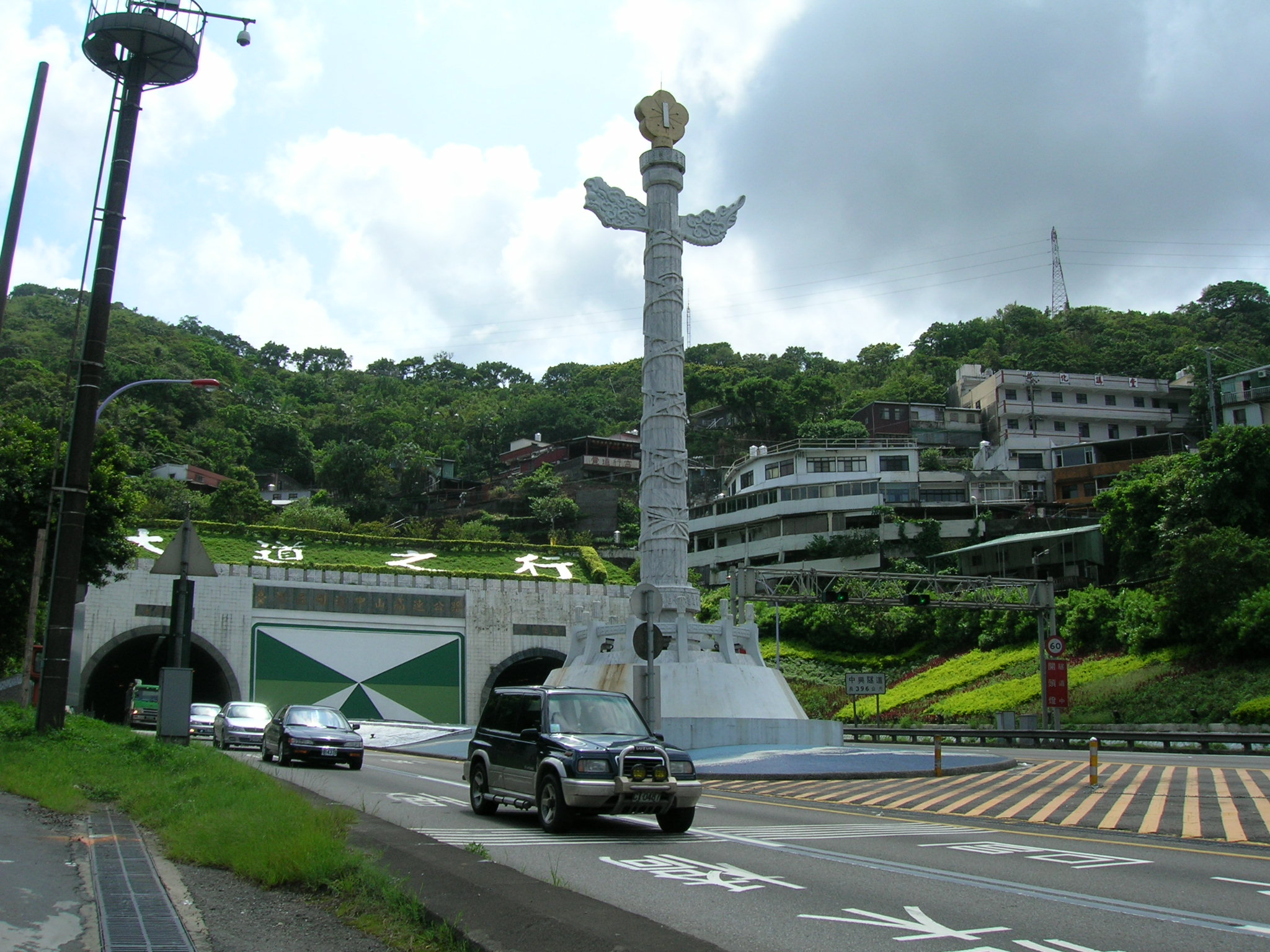 中山高速公路（國道1號）基隆端。Bân-lâm-gú: Tiong-san ko-sok kong-lōo (kok-tō it-hō) Ke-lâng tuan.